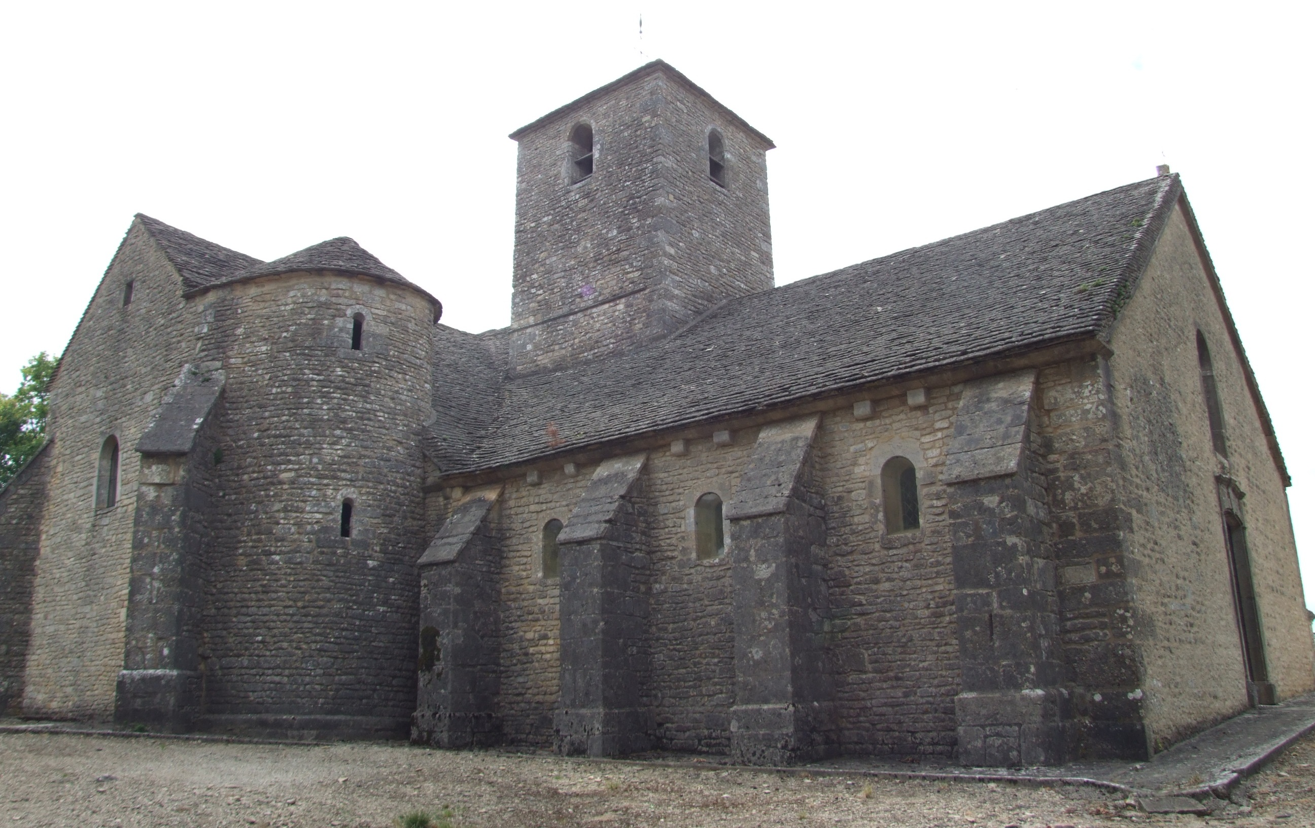 Église Saint-Marcel de Vix, Vix, Côte-d'Or, Bourgogne, FRANCE